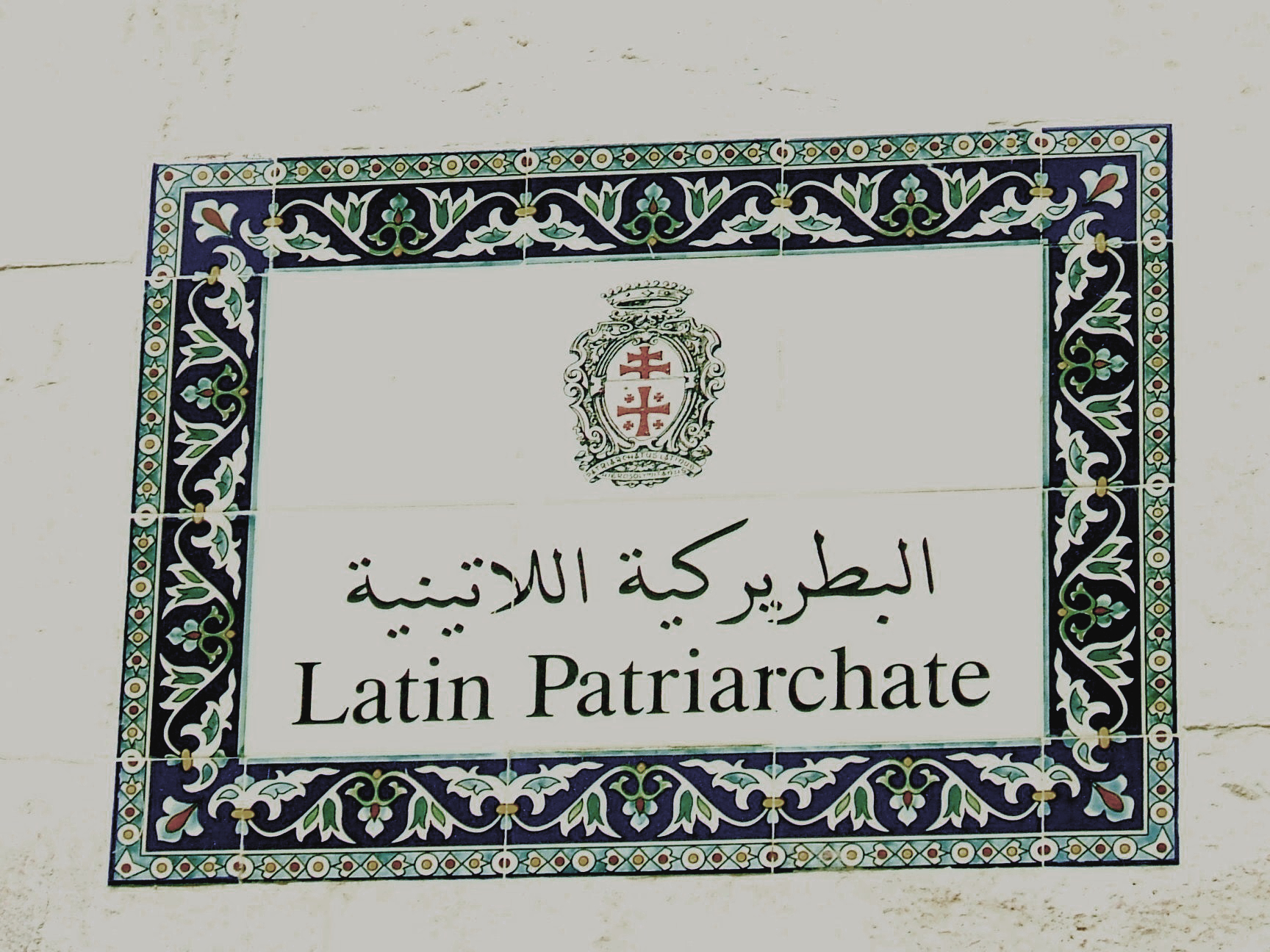 Insegna Ingresso Patriarcato Latino Gerusalemme